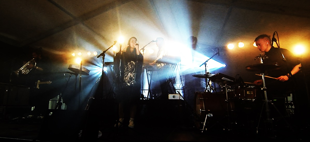 Highasakite lors du Steinkjerfestival 2014 (Steinkjer, Norvège)